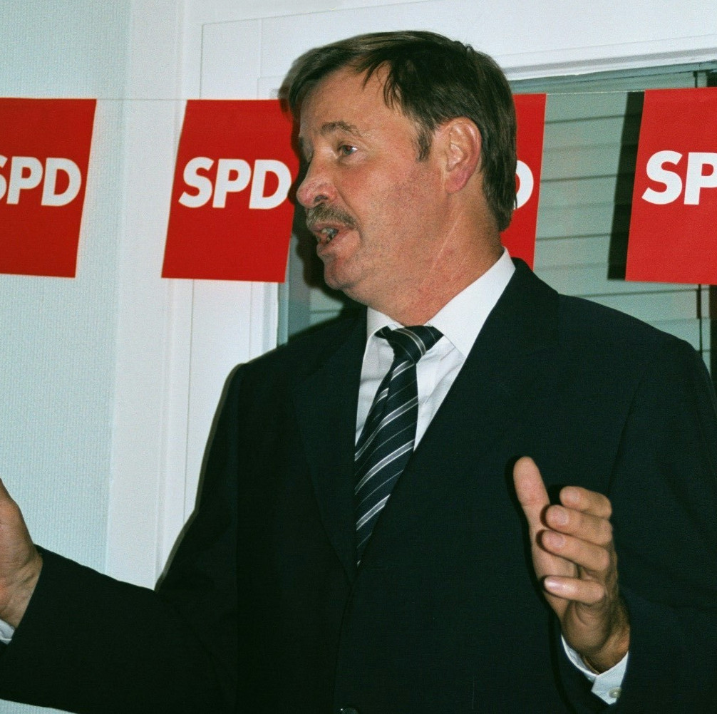 Ortwin Runde bei einer Wahlparty in Hamburg.